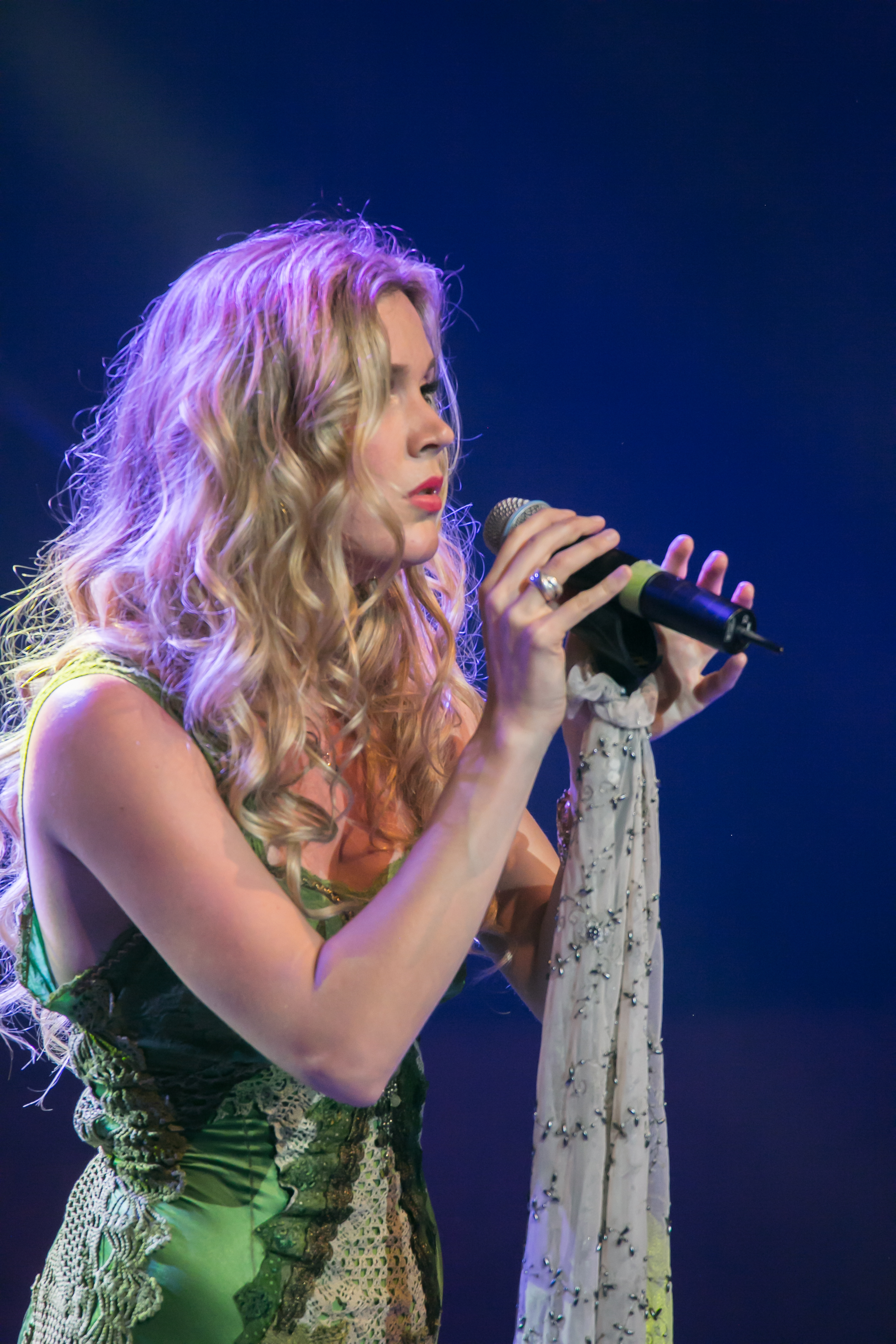 Joss Stone en concierto. Managua, Nicaragua 21 de enero 2016.